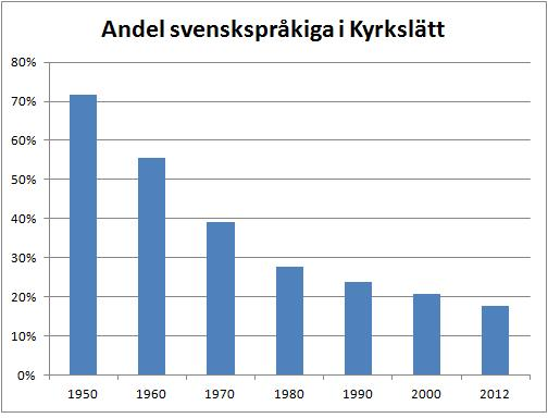 Andel svenskspråkiga i Kyrslätt 1950-2012. Källa